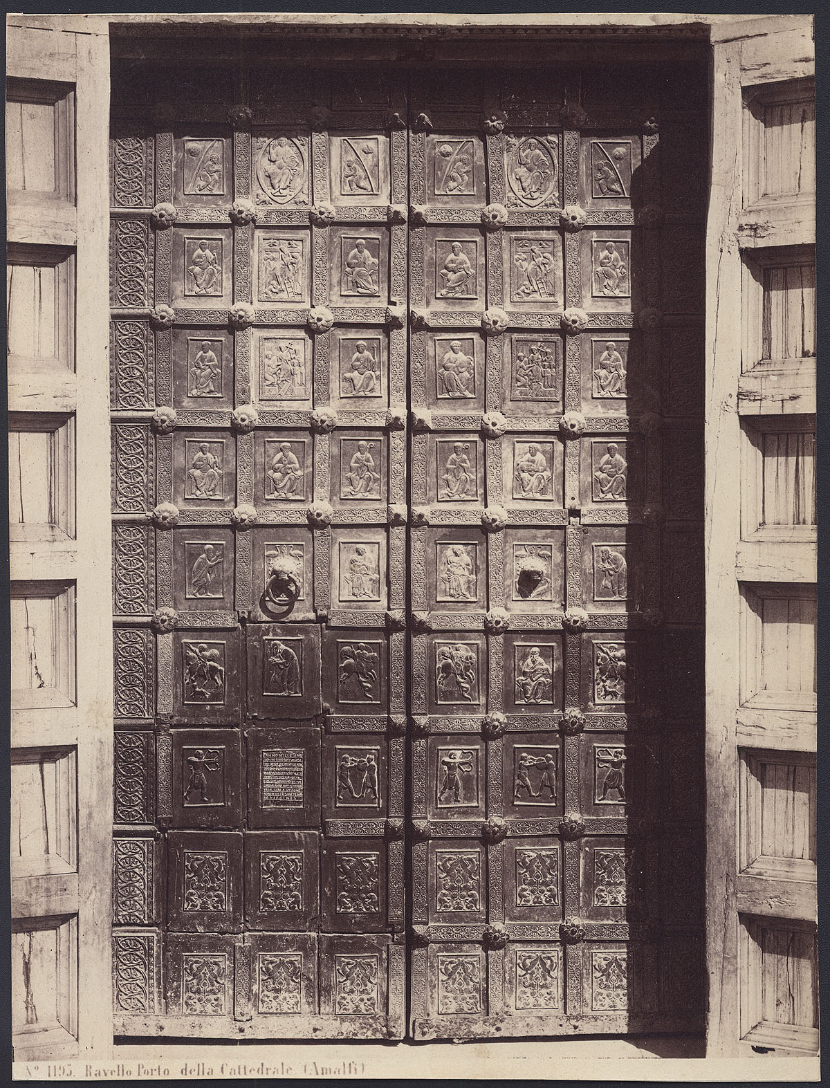 Giorgio Sommer, Albumin, aufgerollt auf Karton 18x24cm. No. 1195: Ravello, Porta della Cattedrale, mit Prägestempel rechts unten im Bild: G. Sommer. The image mentioned below shows a detail of the door to give an idea of the quality of these contact prints.